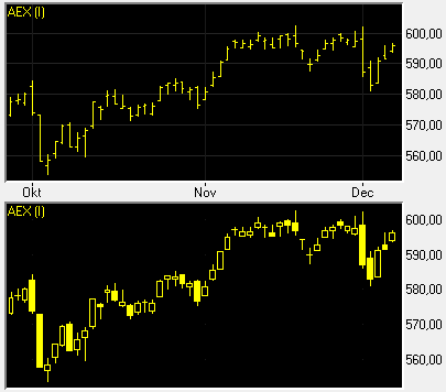 Voorbeeld koersbars op de AEX-index